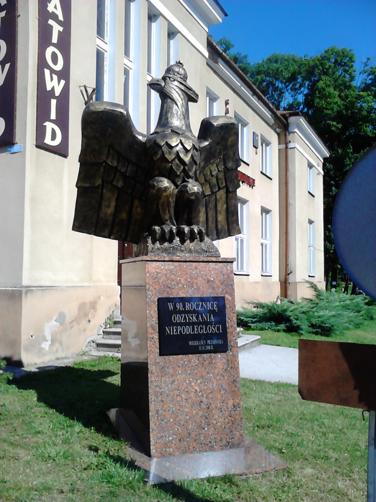 Pomnik upamiętniający niepodległość Polski przy domu kultury w Przasnyszu